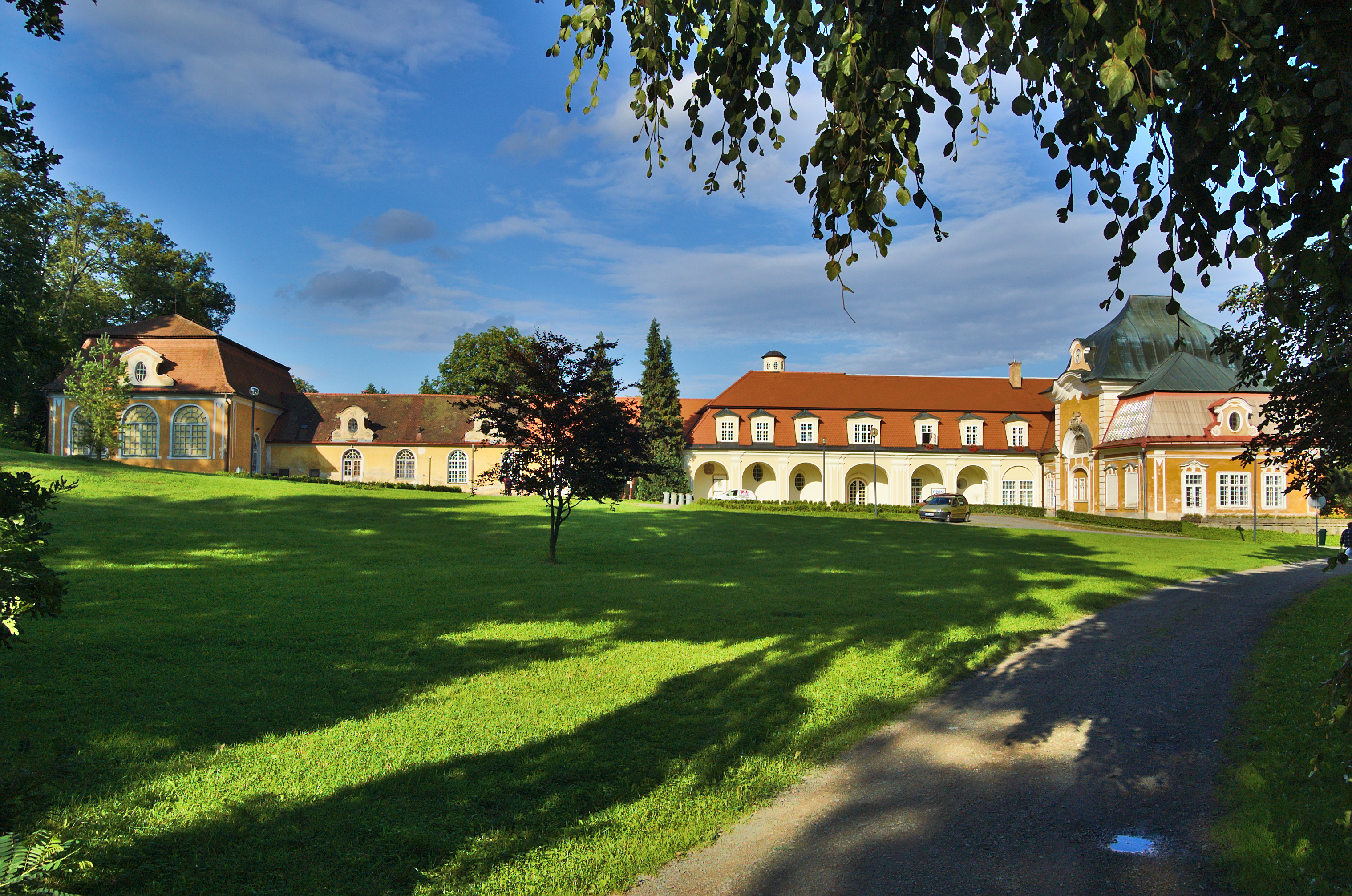 Zámek Velké Opatovice, okres Blansko